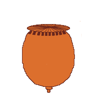 Morfología del fruto, cápsula poricida. Según Simpson (2005) Plant Systematics.